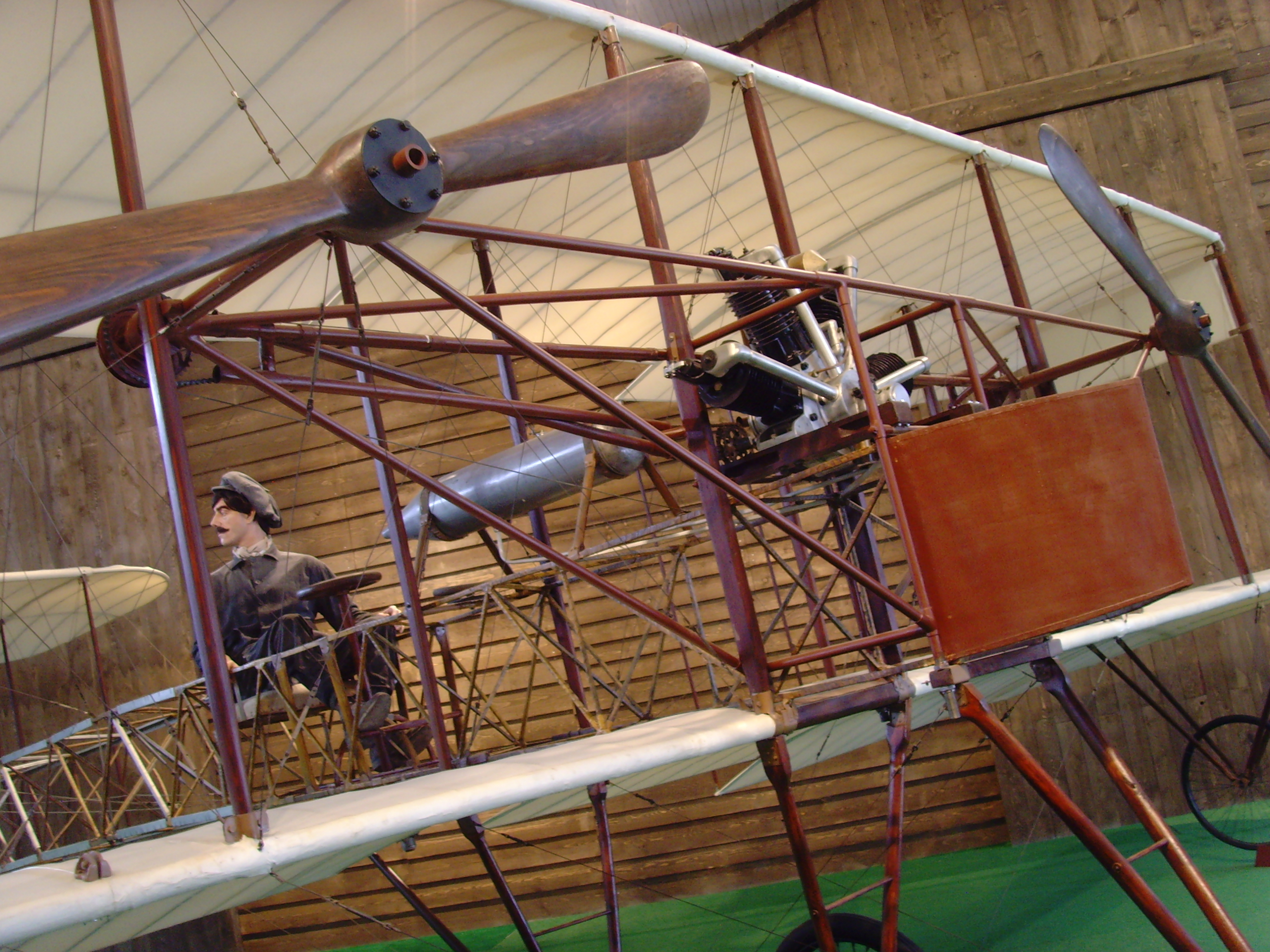 13 Volandia - Caproni Ca 1